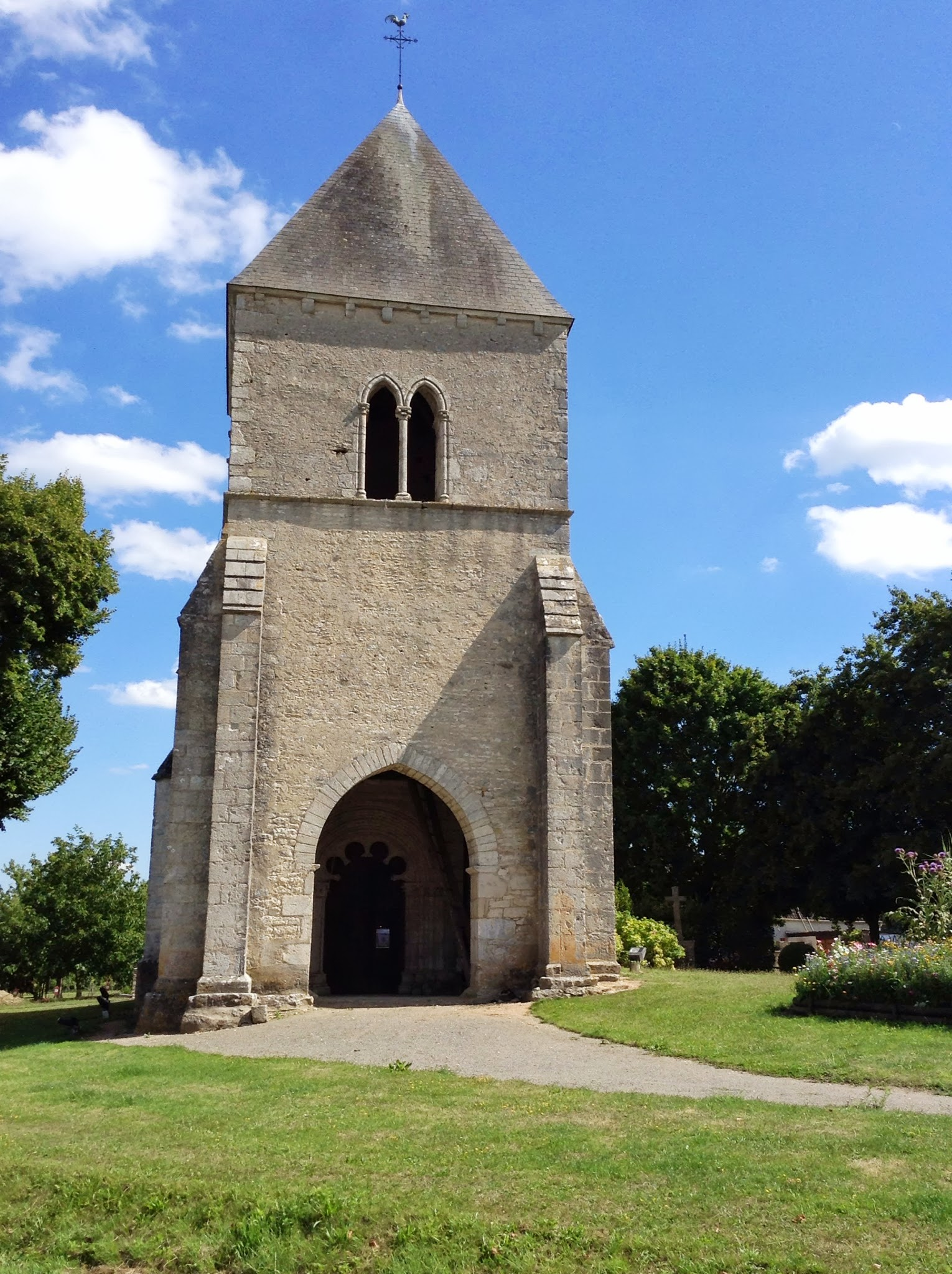 Église Saint-Symphorien, Saint-Symphorien (Cher)